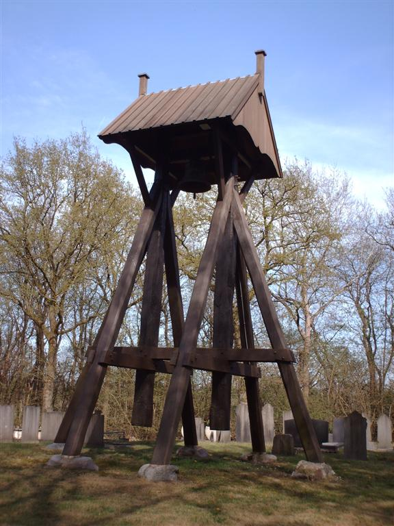 Klokkenstoel in Nijeberkoop